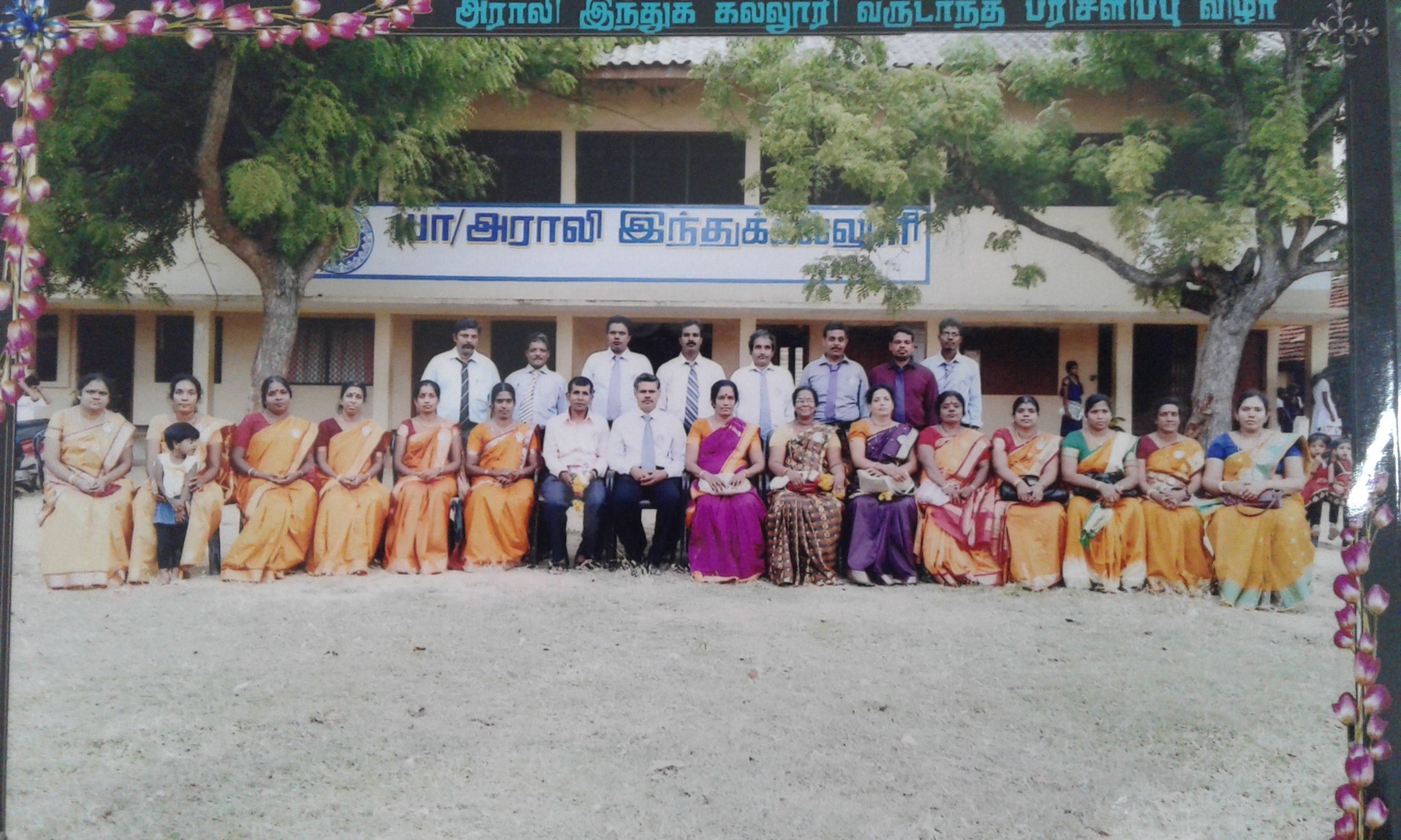 Pricegiving 2015